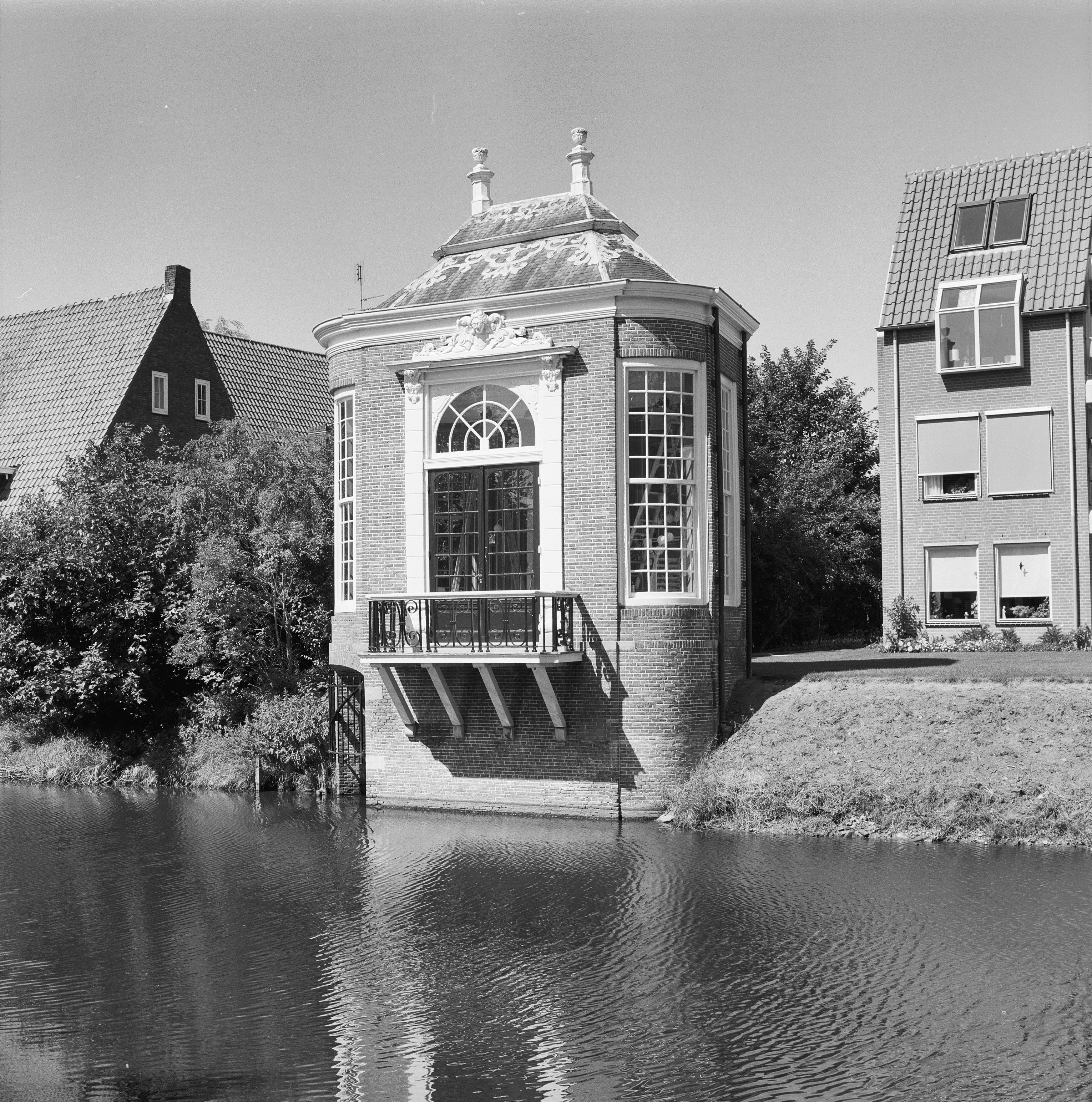 Huis De Griffioen: Exterieur THEEKOEPEL